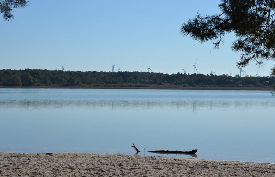 Treptowsee, Blick von der Badestelle; Gemeinde Marnitz, Mecklenburg-Vorpommern